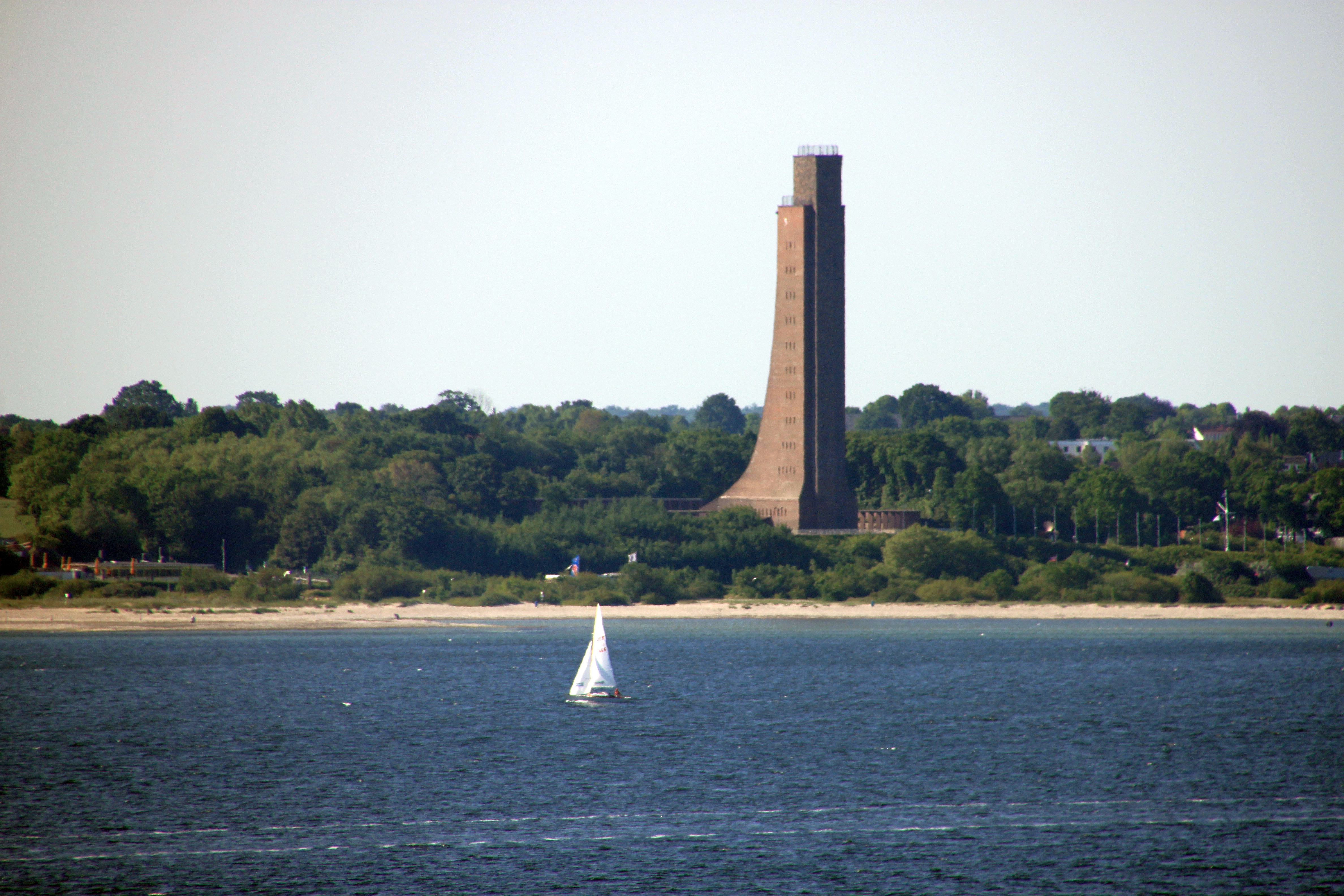 Marinehrenmal Laboe